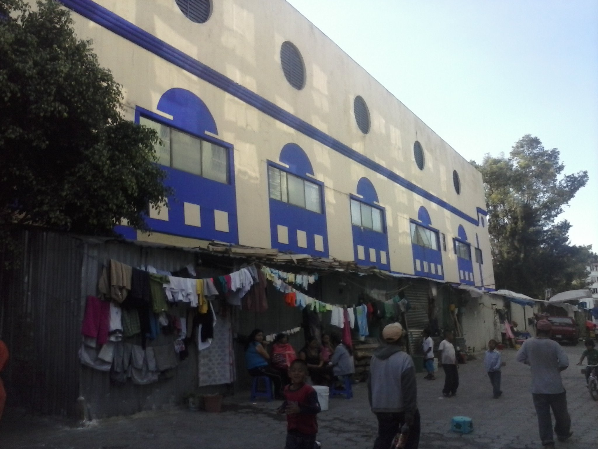 Vista donde se observa la falta de atención a un sector de la población a pesar de estar en el siglo XXI, esto en los alrededores del "Archivo General de Notarías del Distrito Federal"